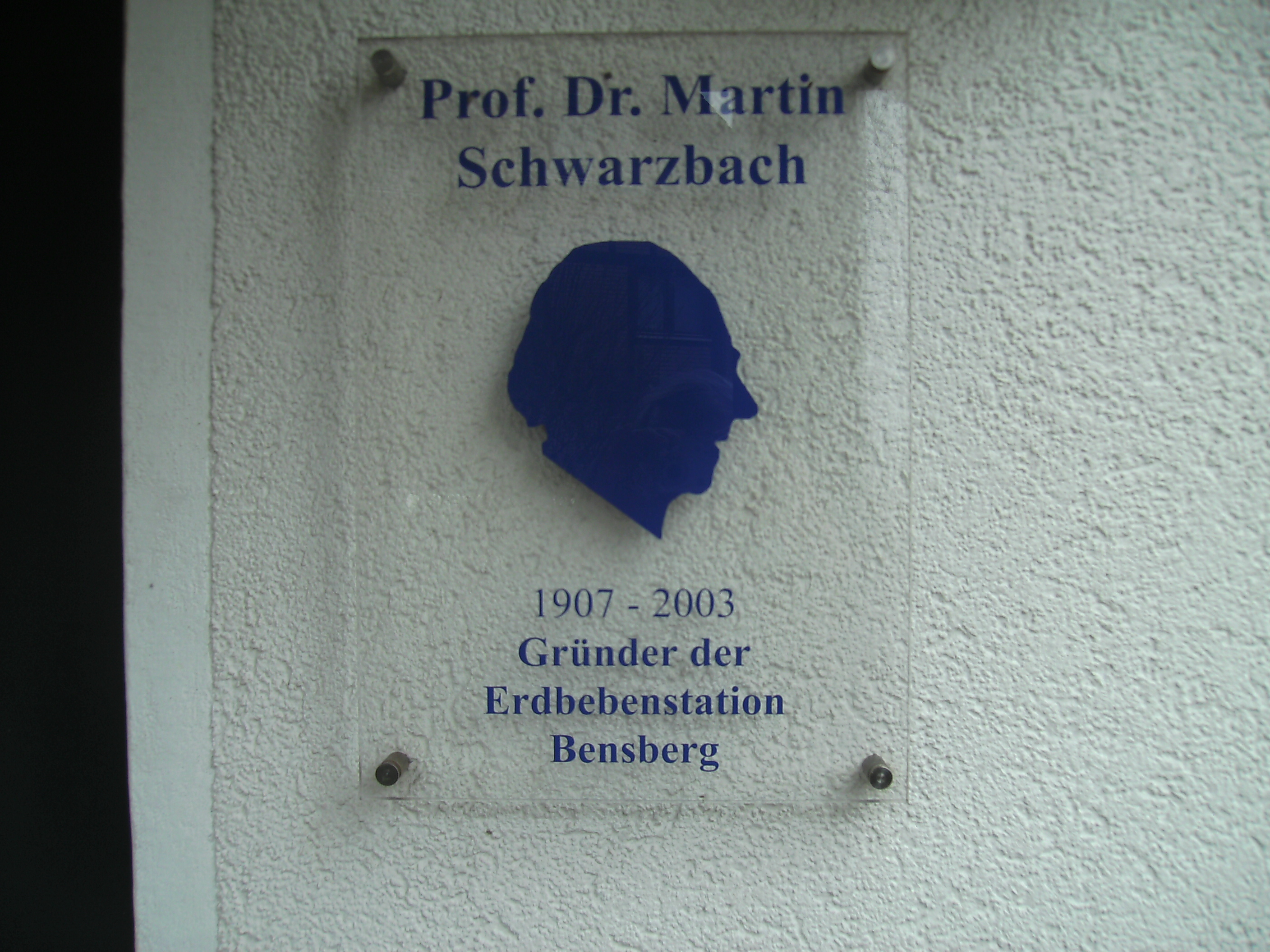 Die Erdbebenstation Bensberg in Bergisch Gladbach (Nordrhein-Westfalen) ist eine Einrichtung der Universität zu Köln. Sie wurde von Prof. Dr. Martin Schwarzbach gegründet. Das Gebäude Vinzenz-Pallotti-Str. 26 war auch sein Wohnsitz. Die Tafel ist neben der Haustür angebracht.